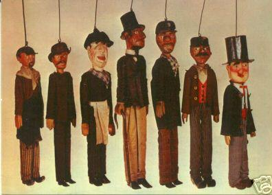 photo d'anciens Tchantchès conservé au musée de la vie Wallone à liège